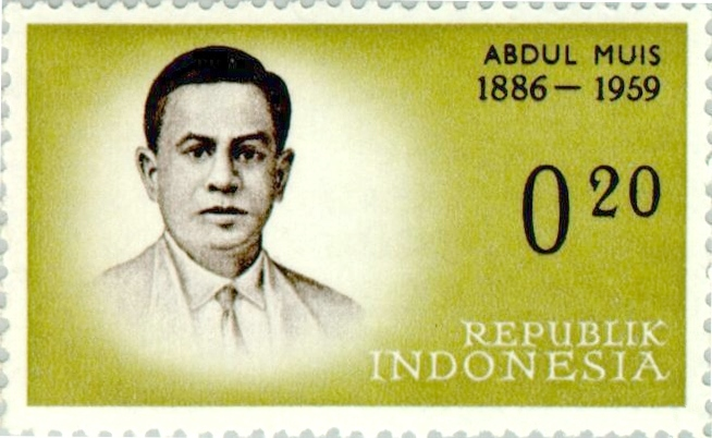 Abdul Muis